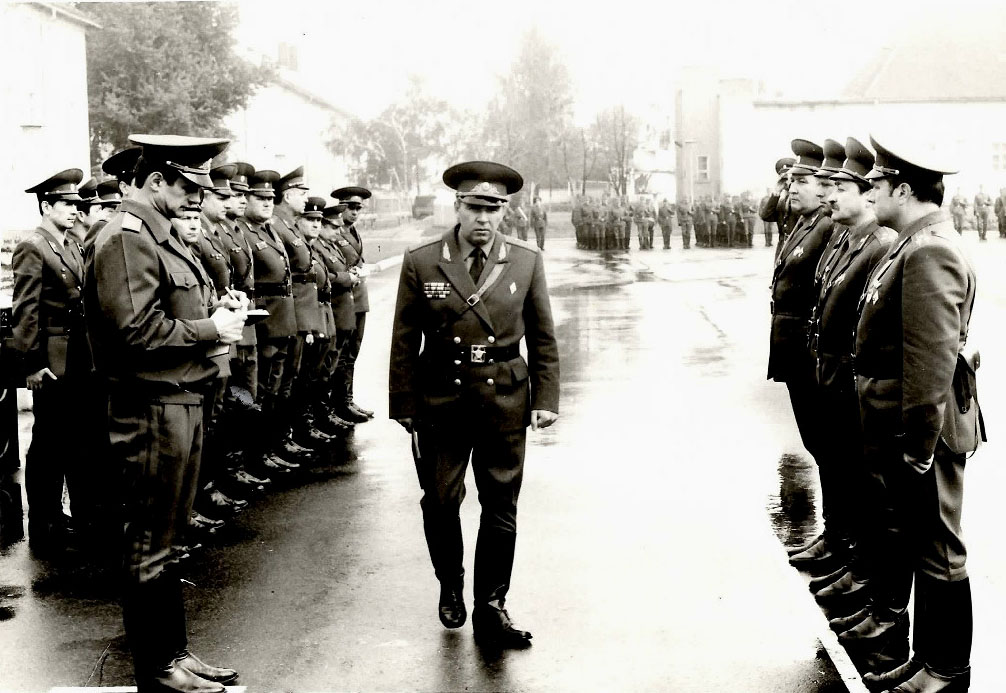 Командующий 8-й гвардейской армией гвардии генерал-лейтенант Соседов В.П. в 57-й гвардейской мотострелковой дивизии. 1992 год